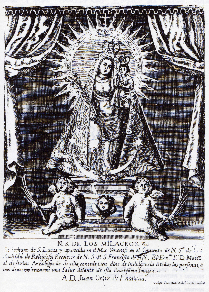 Nª Sª de los Milagros. Grabado del siglo XVIII